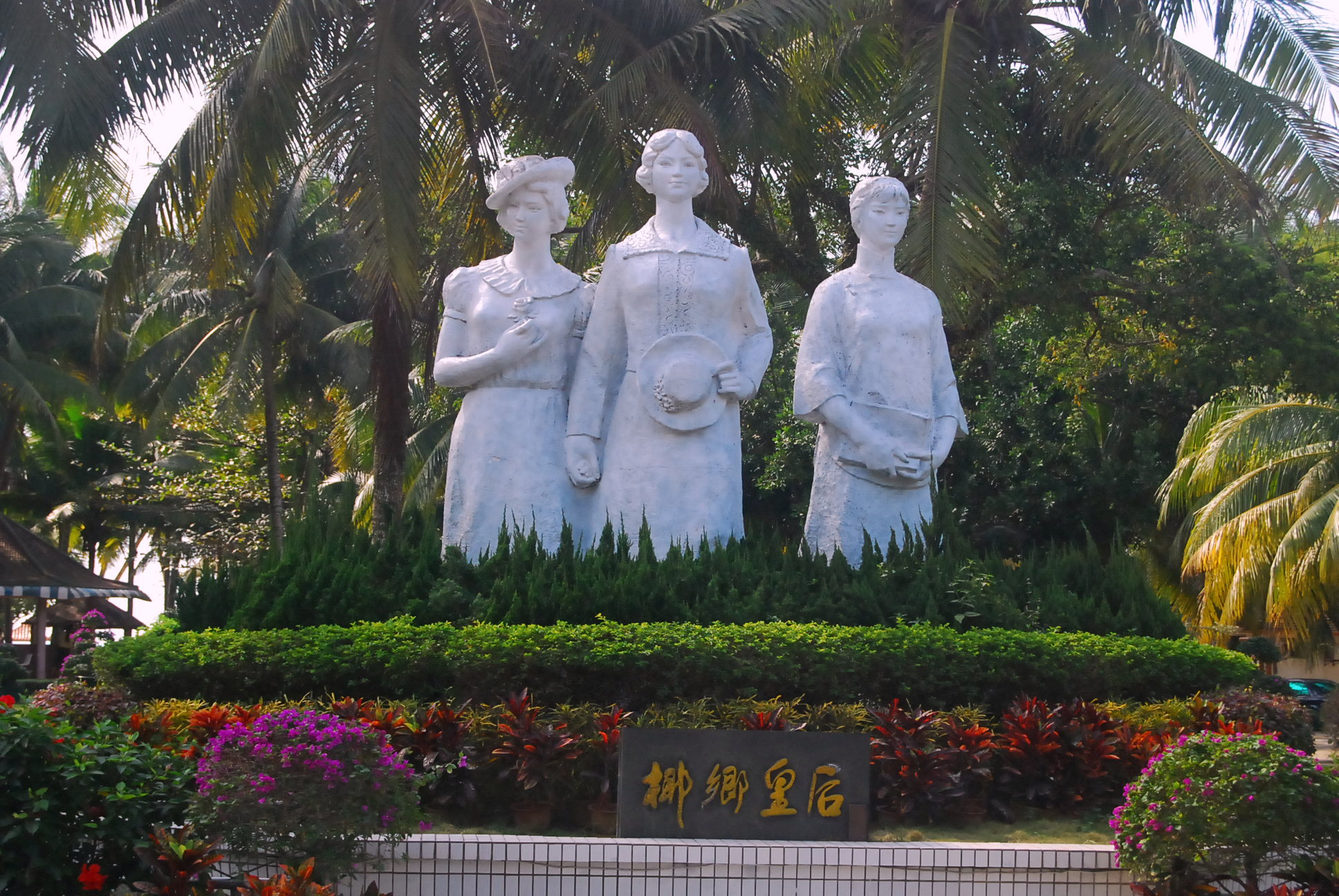 宋氏三姐妹，摄于海南文昌宋庆龄故居